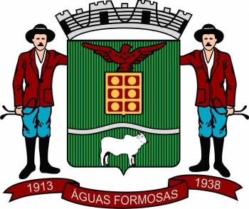 Brasão da Cidade de Águas Formosas - MG